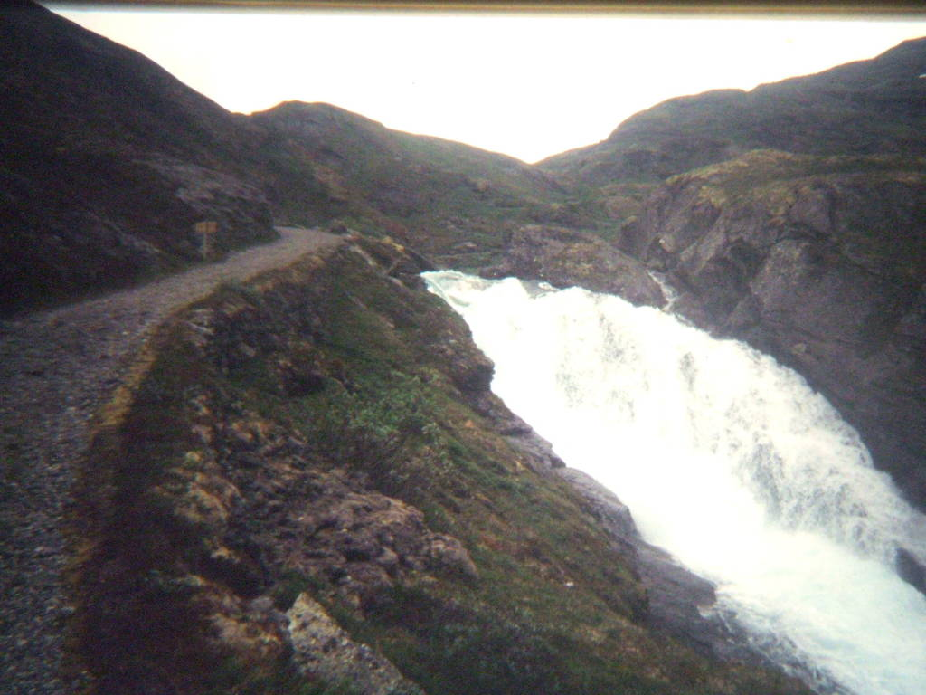 Rallarvegen in Norway; waterfalls between Myrdal and Finse in Kleivagjelet ravine